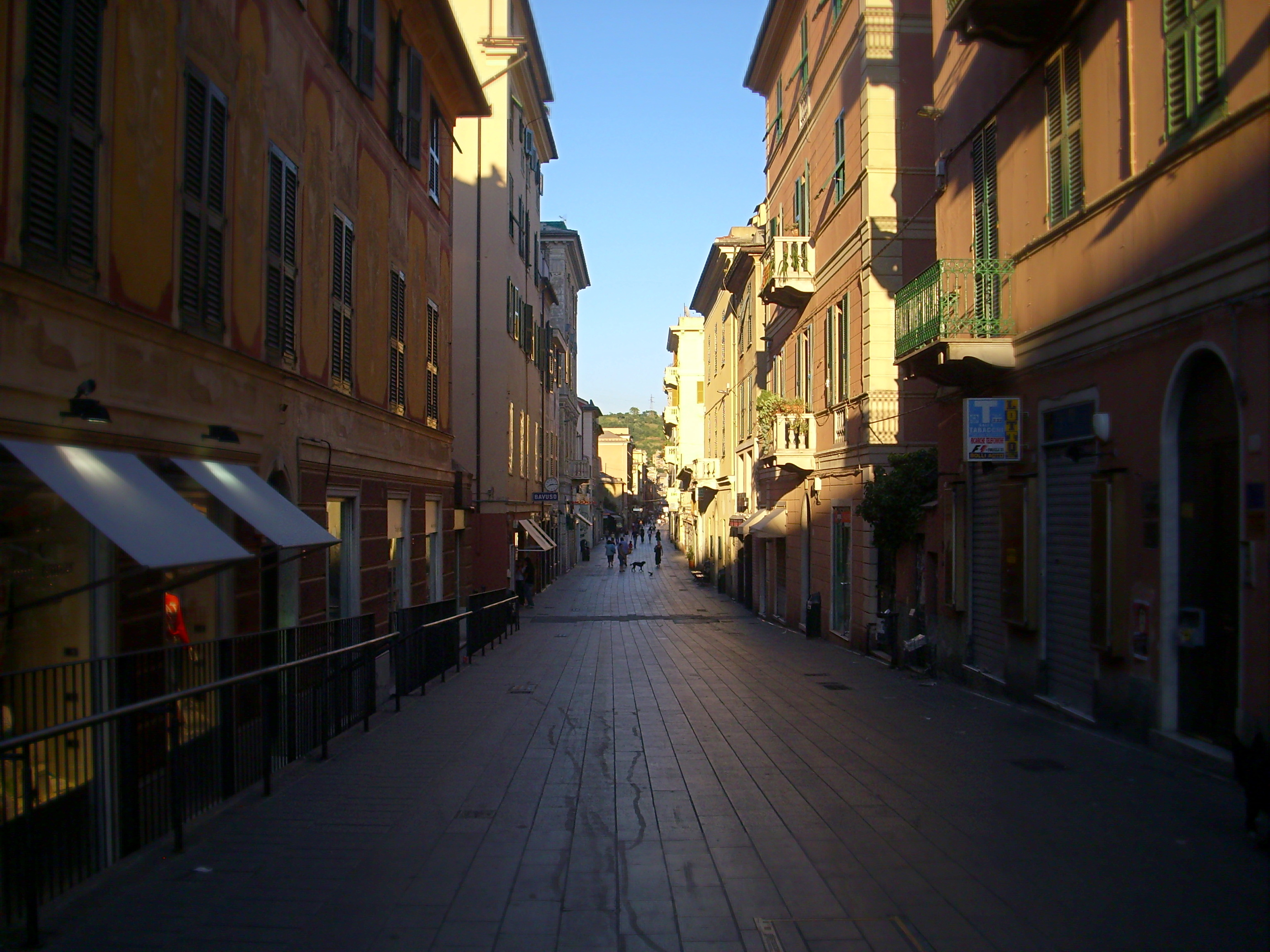 Via Sestri, a Sestri Ponente.